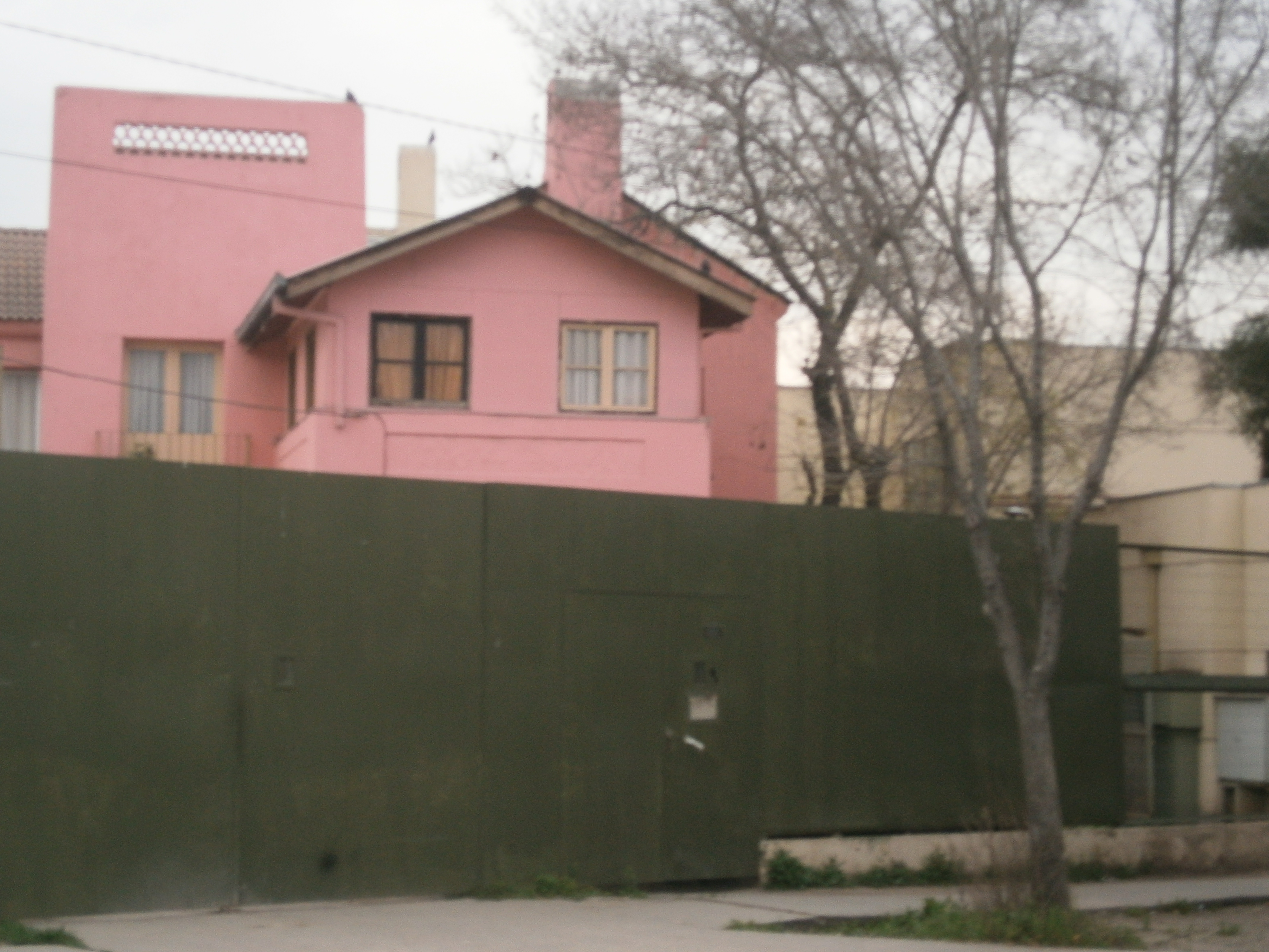 Casa de Administración del Ex Recinto de Detención Tres y Cuatro Álamos This is a photo of a national monument in Chile: 2214